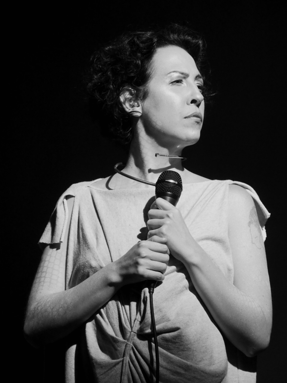 Ligiana Costa no Sesc 24 de maio, 14 de fevereiro de 2020